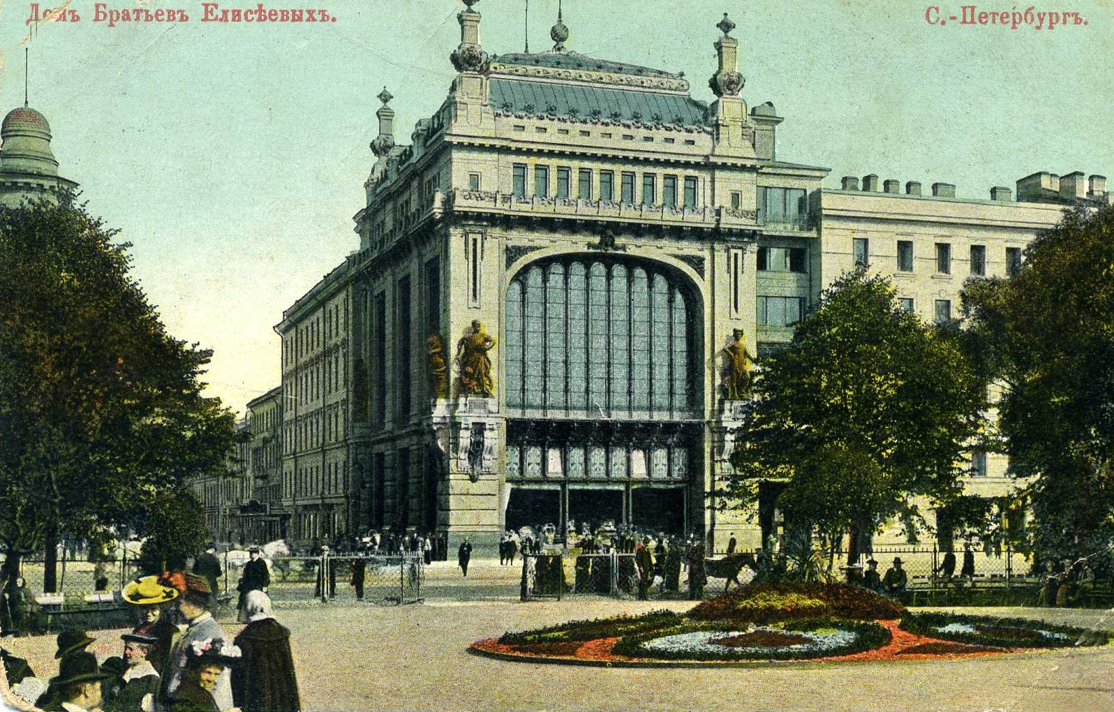 Магазин братьев Елисеевых на Невском проспекте